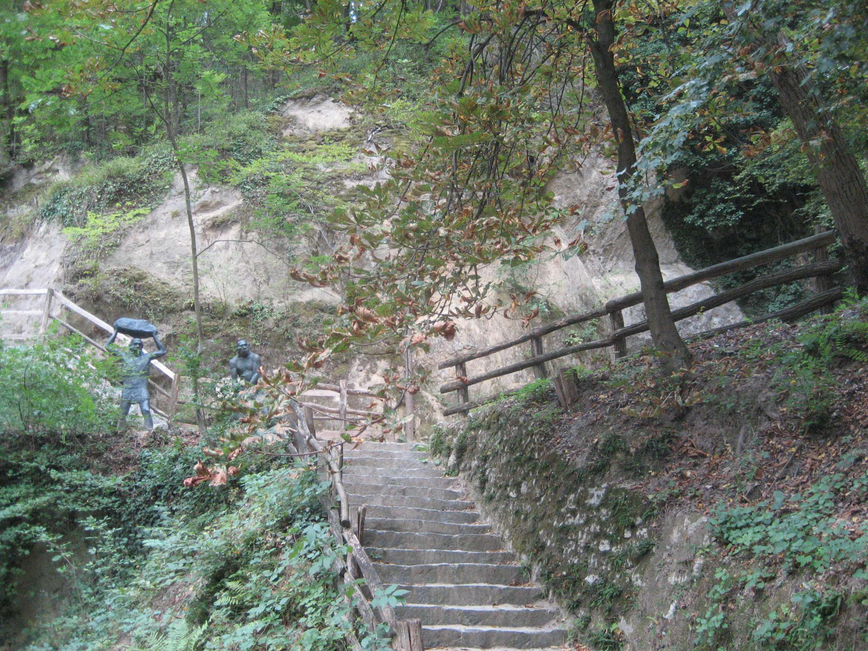 Neanderthal Museum, Krapina